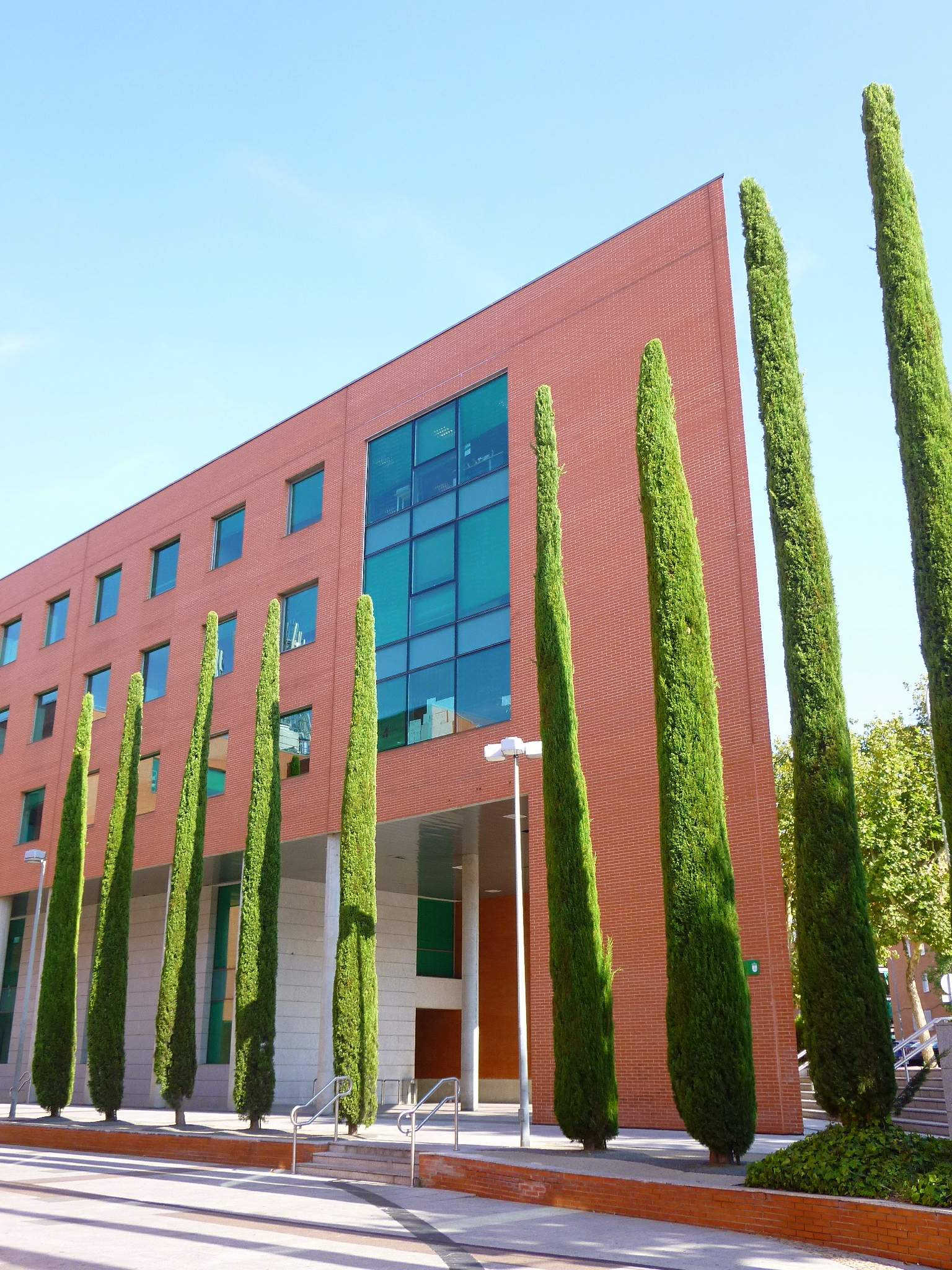 Ayuntamiento de Alcobendas (Madrid)